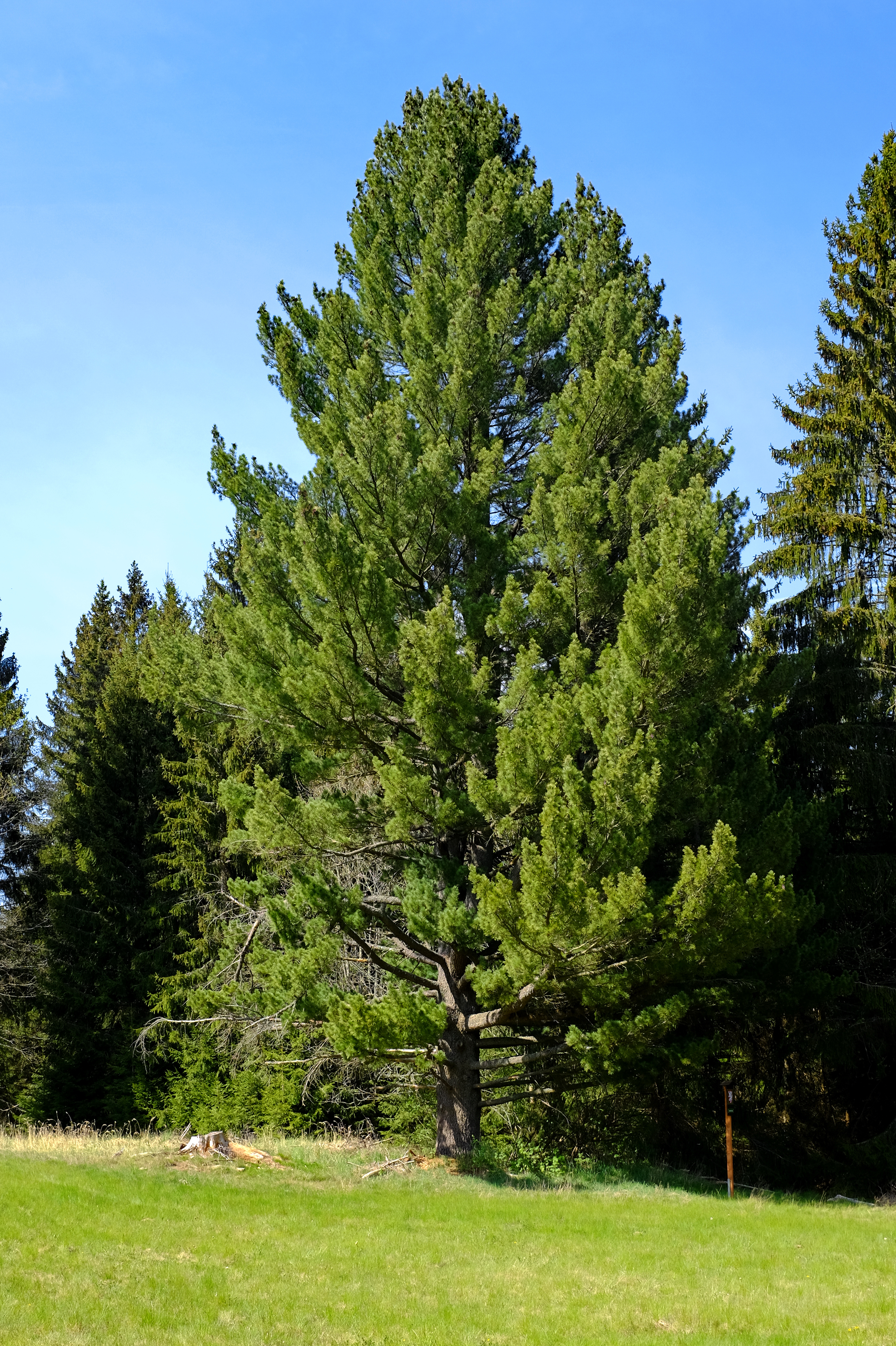 Památný strom - Borovice rumelská na Slatině - Slatina (Stará Voda), zaniklá obec v Českém lese, okres Cheb